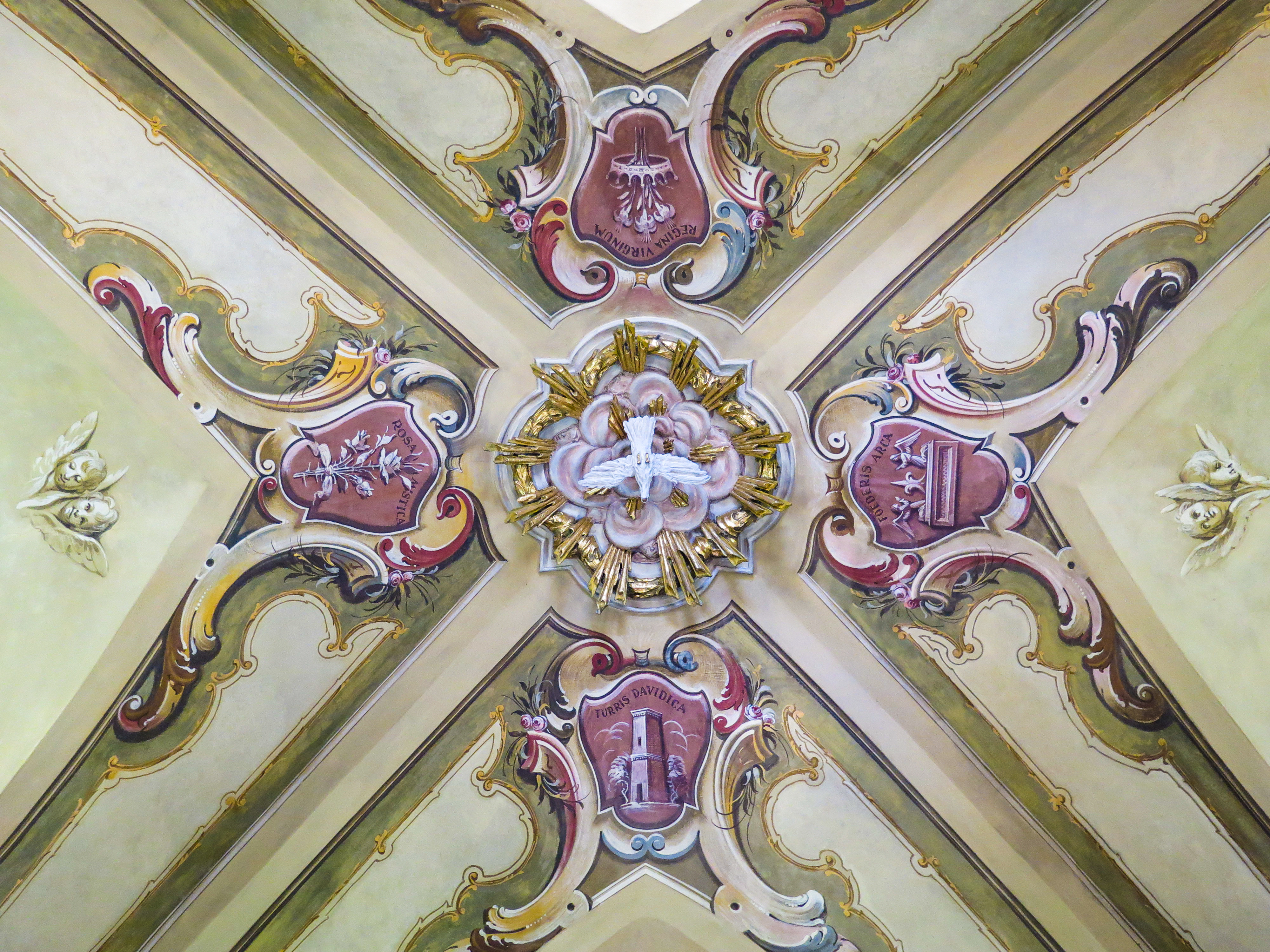 Decorazione della volta della navata della Chiesa di Santa Maria Immacolata presso la Cascina Increa - Brugherio. Celebra la Vergine Maria. This file was uploaded as part of WiBrugherio, a project by Comune di Brugherio in cooperation with Wikimedia Italia.